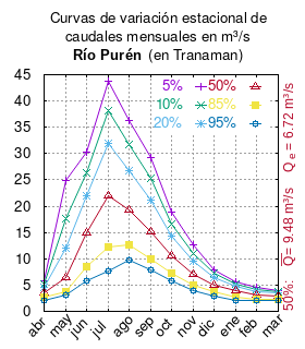 Curva de Variación Estacional Río Purén en Tranaman. # cita publicación # | apellido = Dirección General de Aguas # | nombre = # | enlace-autor = Ministerio de Obras Públicas (Chile) # | título = Diagnóstico y clasificación de los cursos y cuerpos de agua según objetivos de calidad. Cuenca del río Imperial # | ubicación = Santiago de Chile # | editorial = Ministerio de Obras Públicas (Chile) # | año = 2004 # | edición = # | url = # | ref = harv # pág. 44 mes 5% 10% 20% 50% 85% 95% abr 5.816 5.216 4.571 3.552 2.604 2.17 may 24.787 17.69 12.028 6.363 3.707 3.067 jun 30.341 26.318 21.917 14.882 8.533 5.86 jul 43.663 38.082 31.964 21.981 12.237 7.582 ago 36.371 31.648 26.724 19.288 12.682 9.685 sep 29.147 25.232 21.187 15.172 10.056 7.898 oct 18.915 16.627 14.224 10.554 7.308 5.889 nov 12.55 11.057 9.484 7.073 4.929 3.986 dic 7.933 7.236 6.431 5.049 3.638 2.951 ene 5.505 5.136 4.69 3.837 2.787 2.17 feb 4.502 4.162 3.775 3.101 2.379 2.003 mar 3.963 3.73 3.455 2.952 2.369 2.046